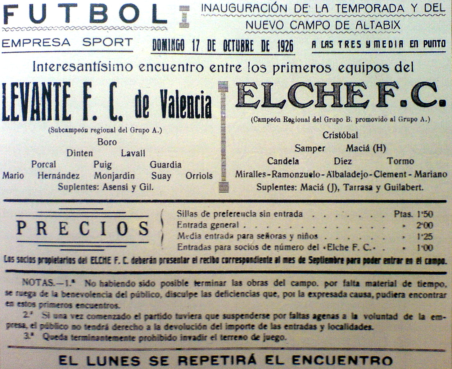 Cartel de la inauguración del campo de Altabix en 1926 Elche, España.